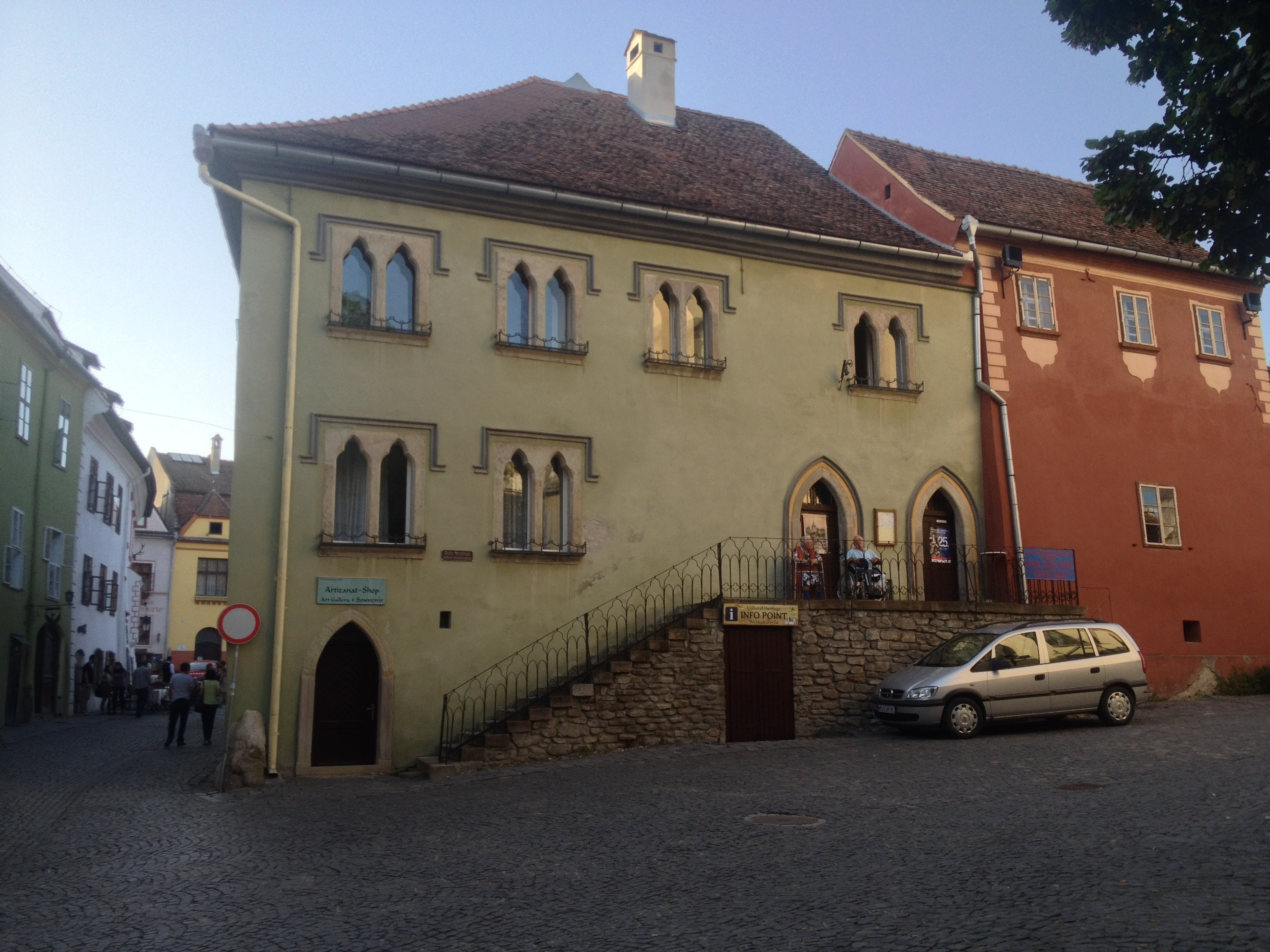 Casa Venetiana - Sighisoara